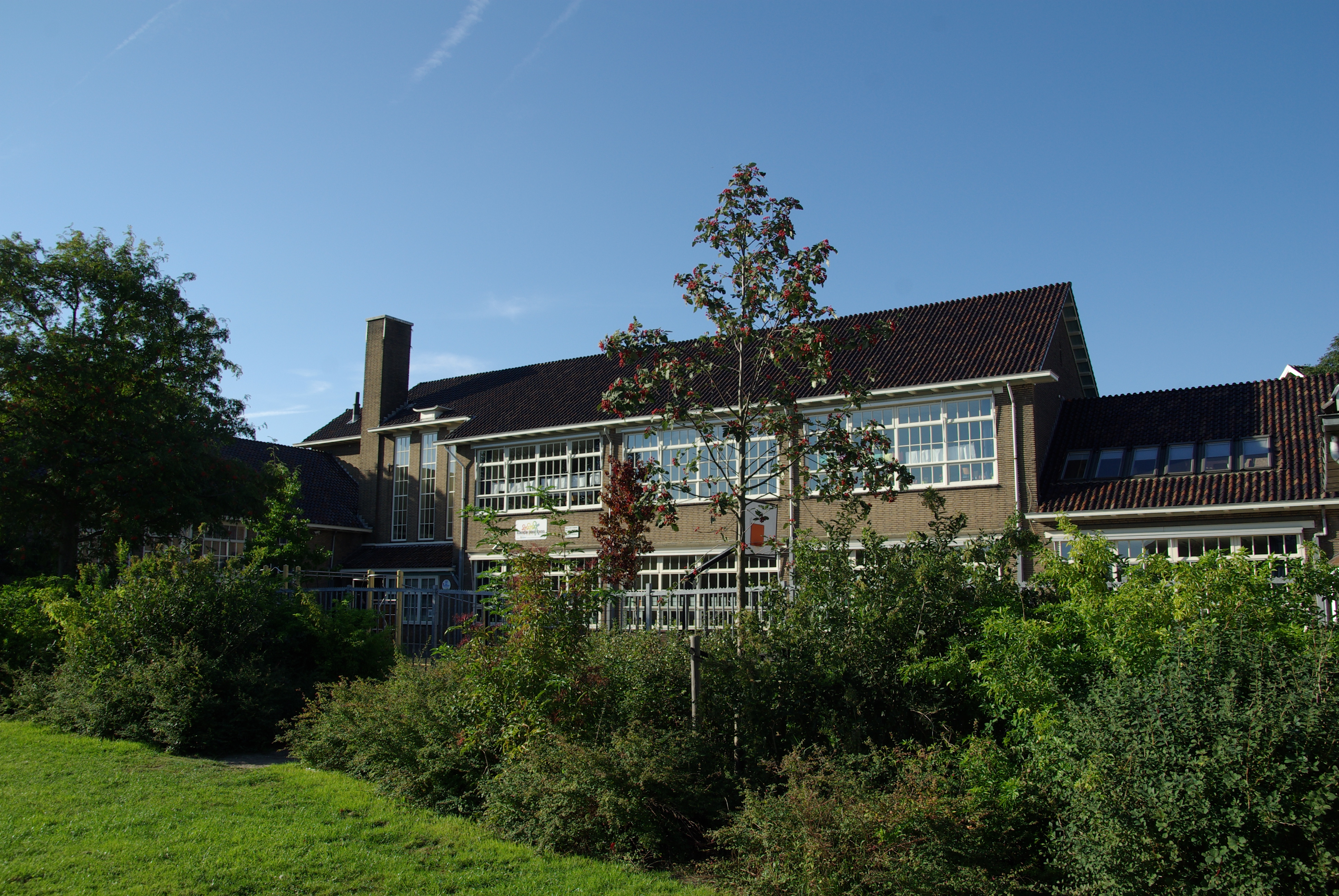 School.